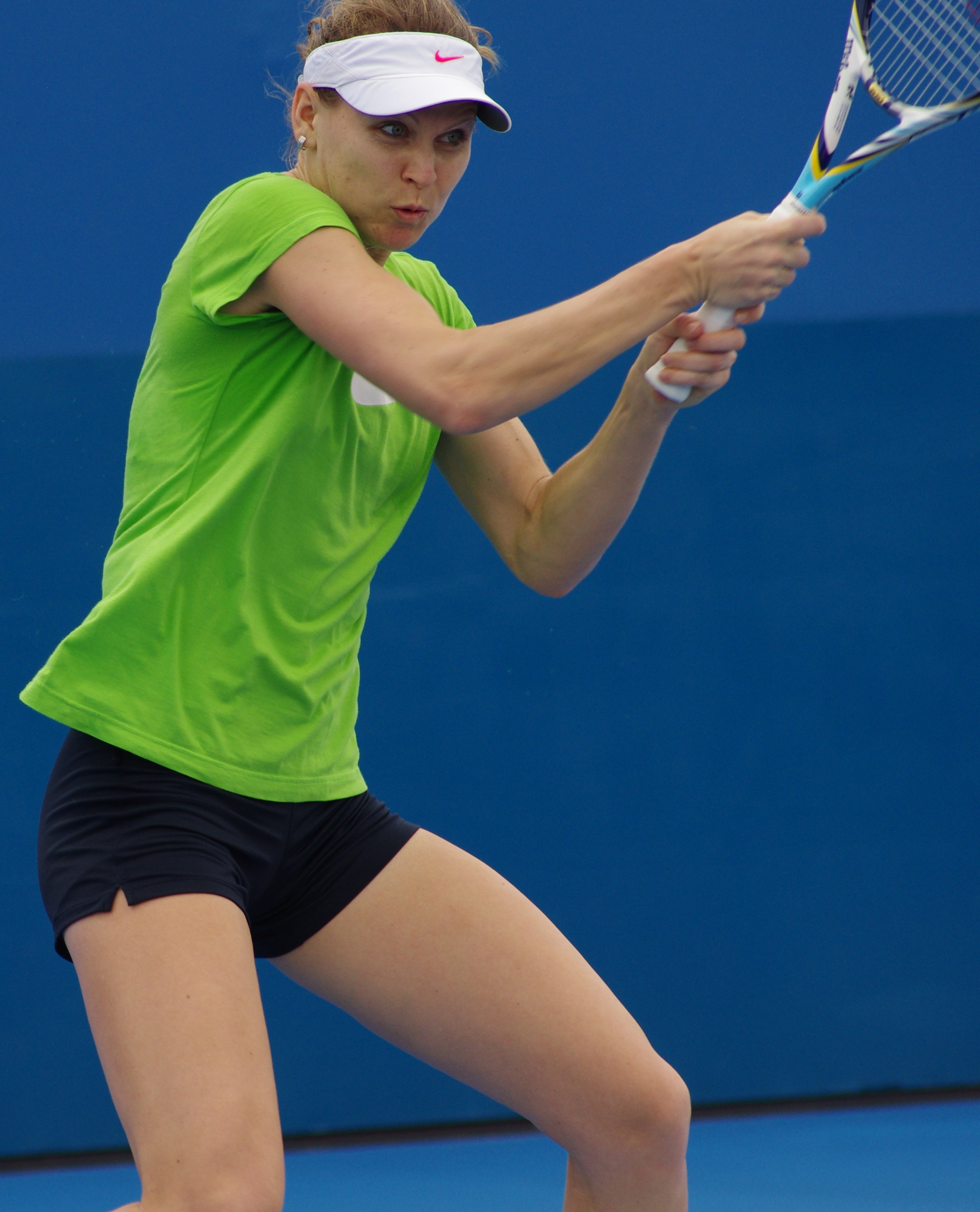 Lucie safarova